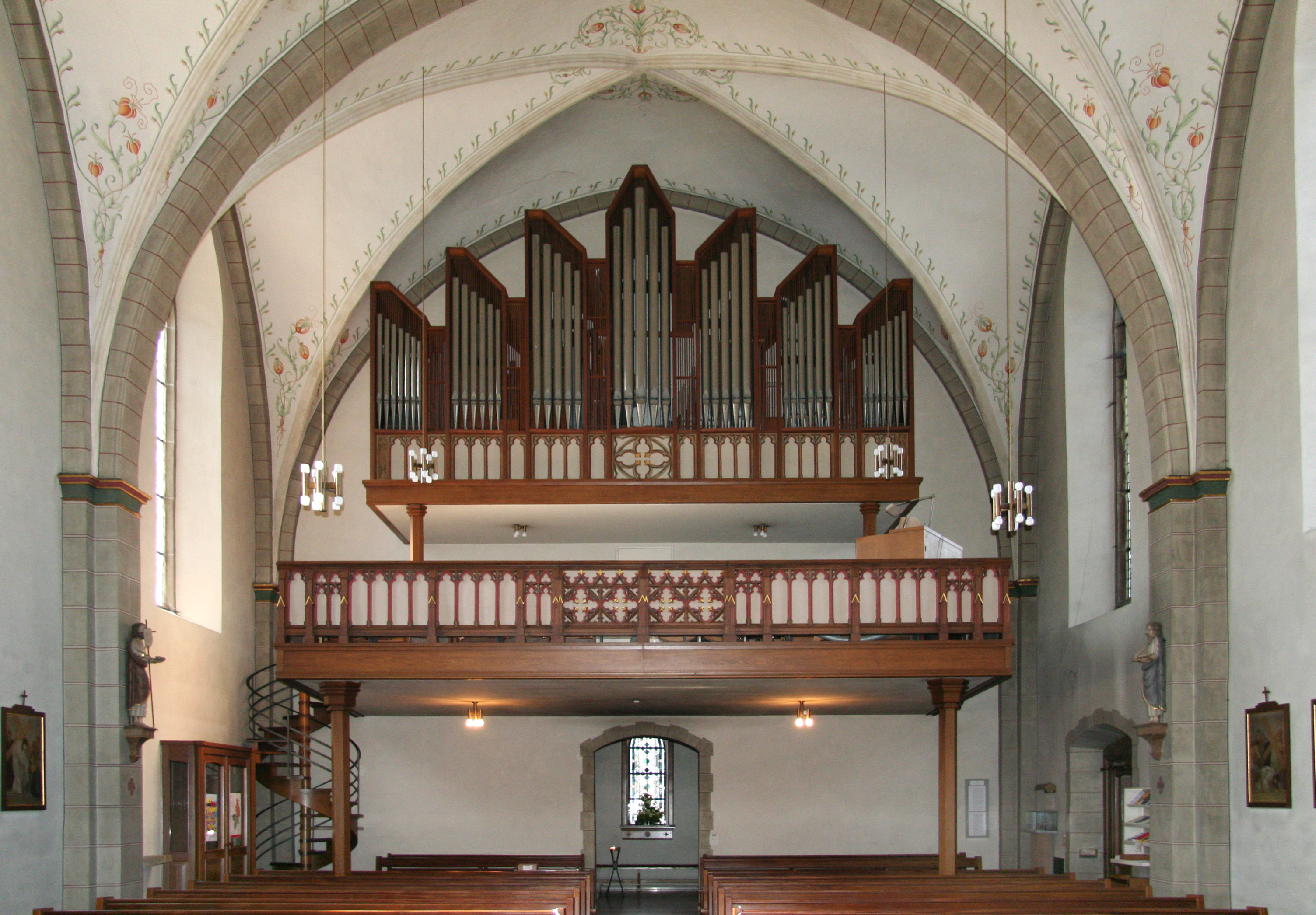 Orgel der Pfarrkirche St. Johannes Baptist in Züschen